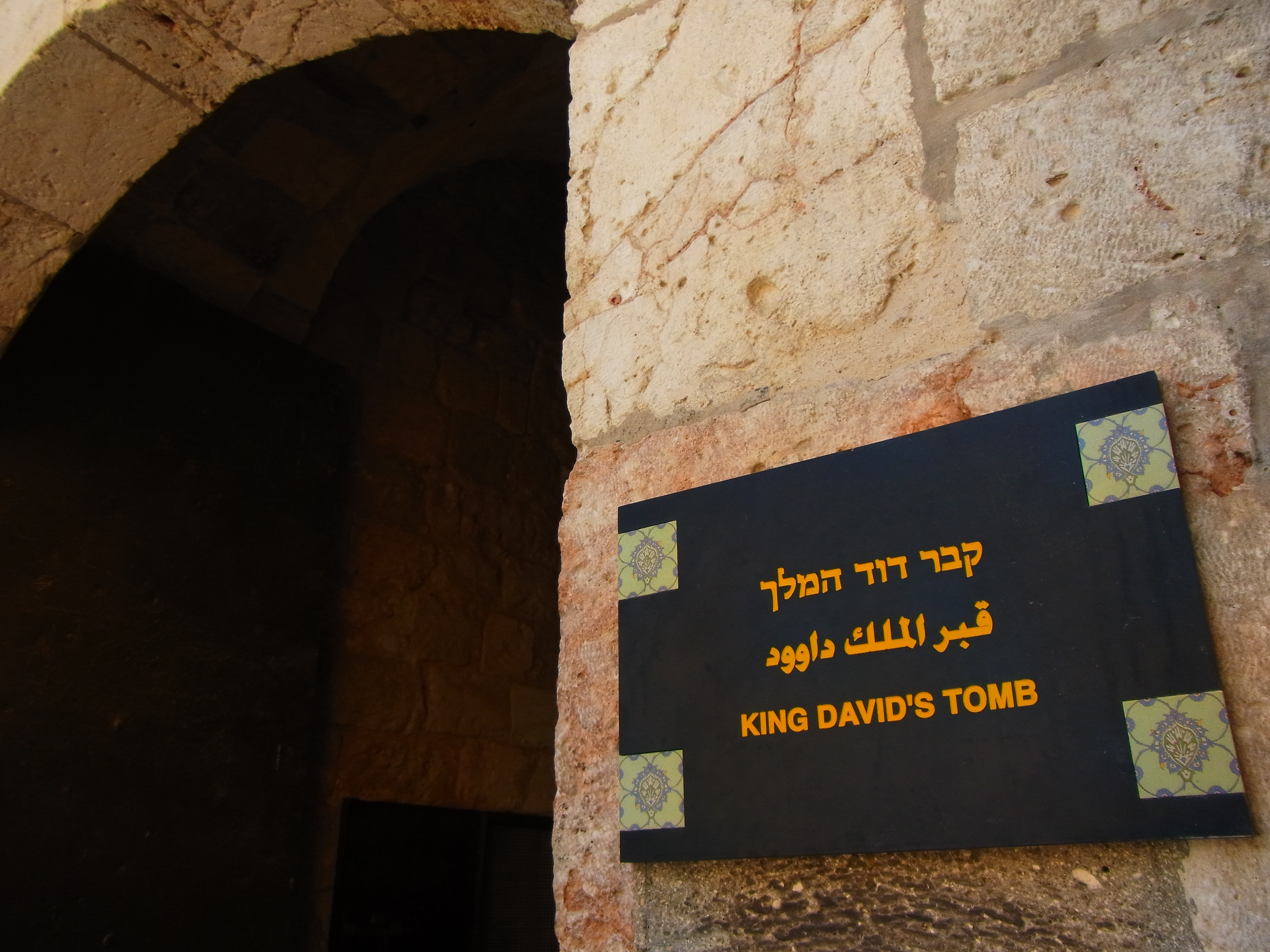 中文（香港）: 以色列君王大衛之墓